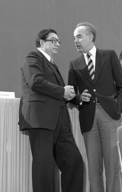 28. Ordentlicher Bundesparteitag der FDP in der Kieler Ostseehalle. (Werner Maihofer, Hans Friderichs) 6.-8.11.1977